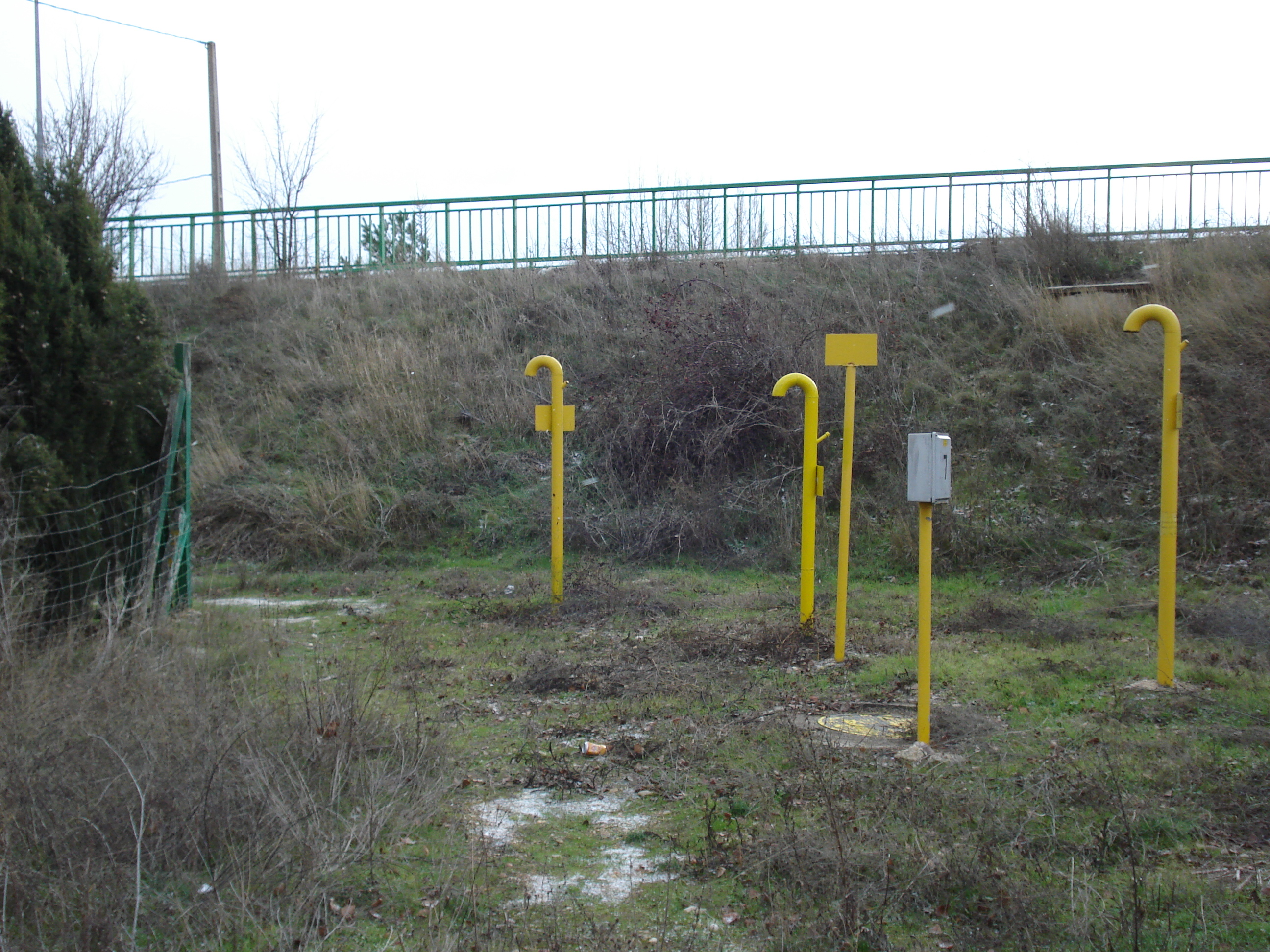 Señal de reconocimiento gasoducto